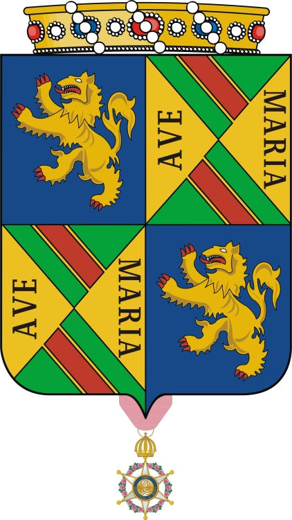 Esquartelado: I e IV - Castelo Branco: de azul, com um leão de ouro, armado e lampassado de vermelho; II e III - Mendonça: franchado: 1 e 4 de verde com uma banda de vermelho perfilada de ouro; 2 e 3 - de ouro, com os caracteres a negro AVE MARIA. Medalha oficial da Imperial Ordem da Rosa.